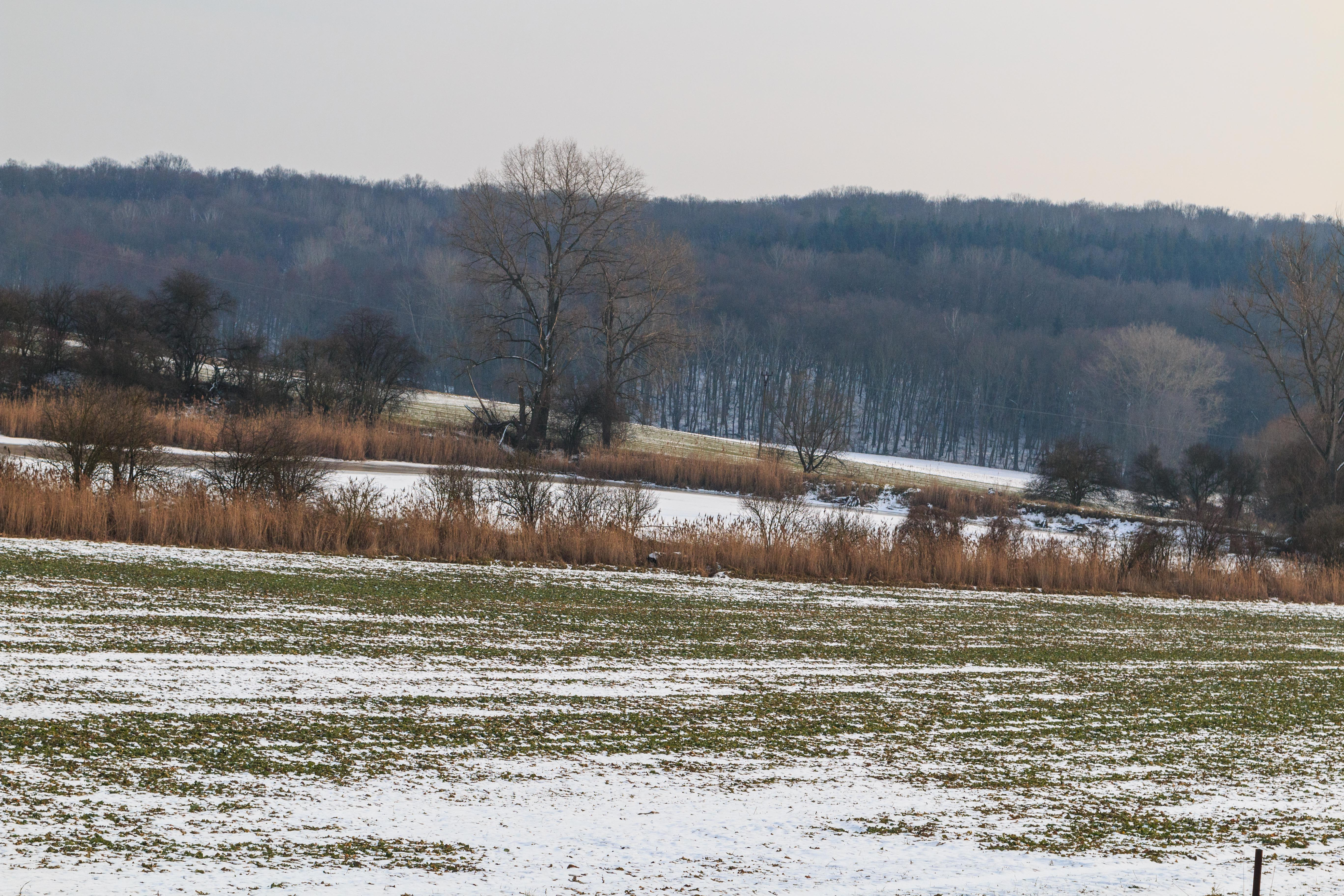 Rybník Petrovec u Údrnic